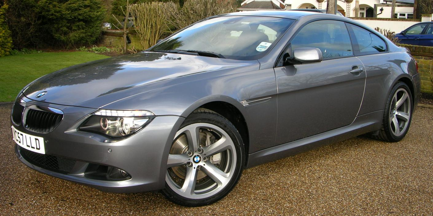 2007 BMW 635d Sport